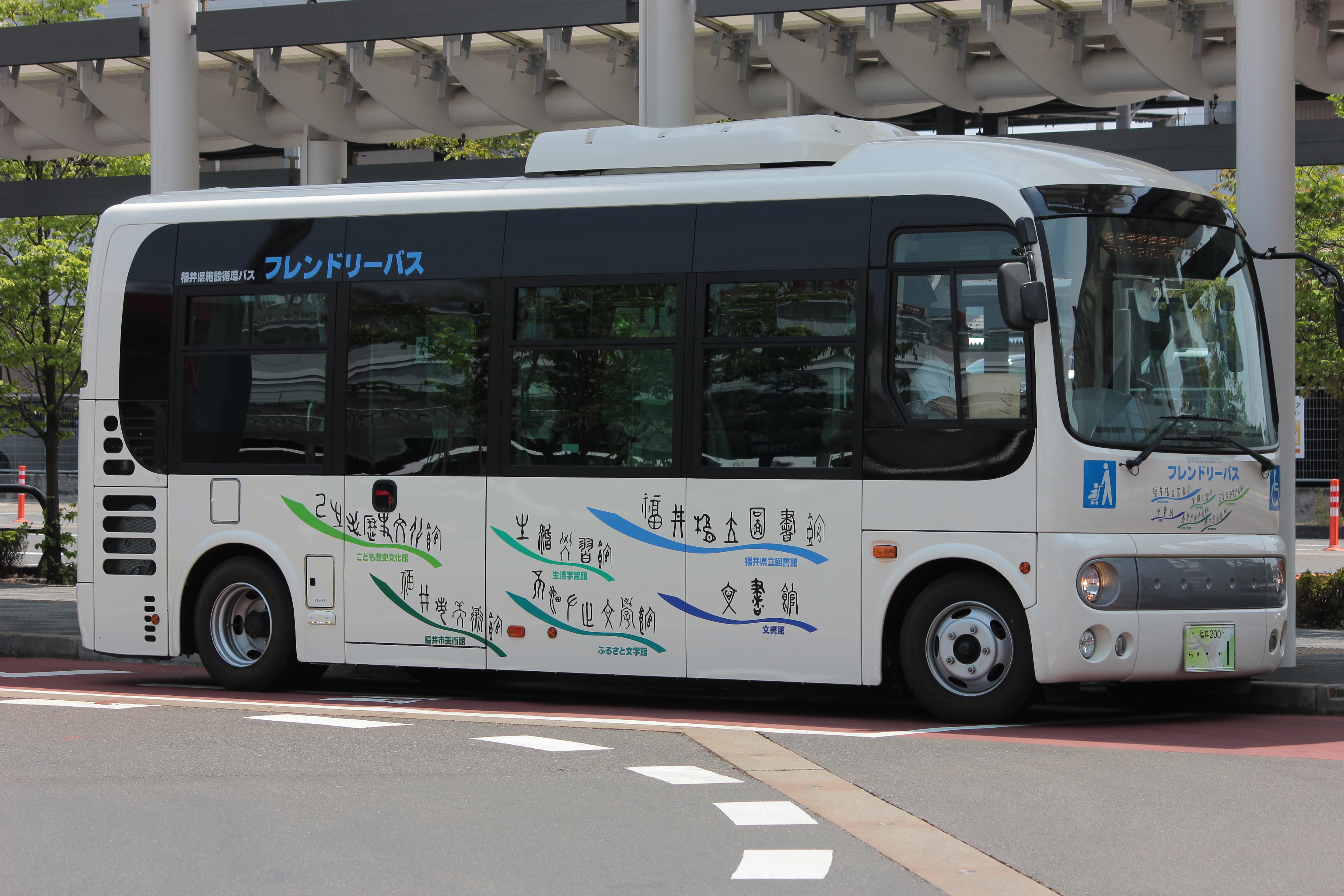 フレンドリーバス、福井駅と福井県立図書館を結んでいる。 Canon EOS Kiss X5